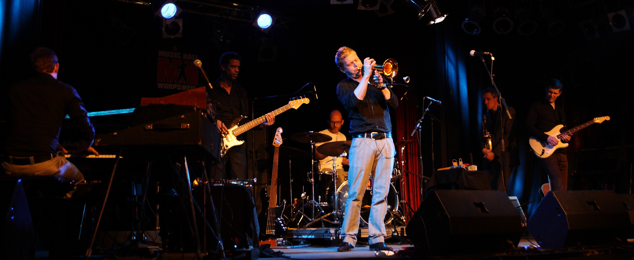 Nils Wülker Group in der Music Hall in Worpswede